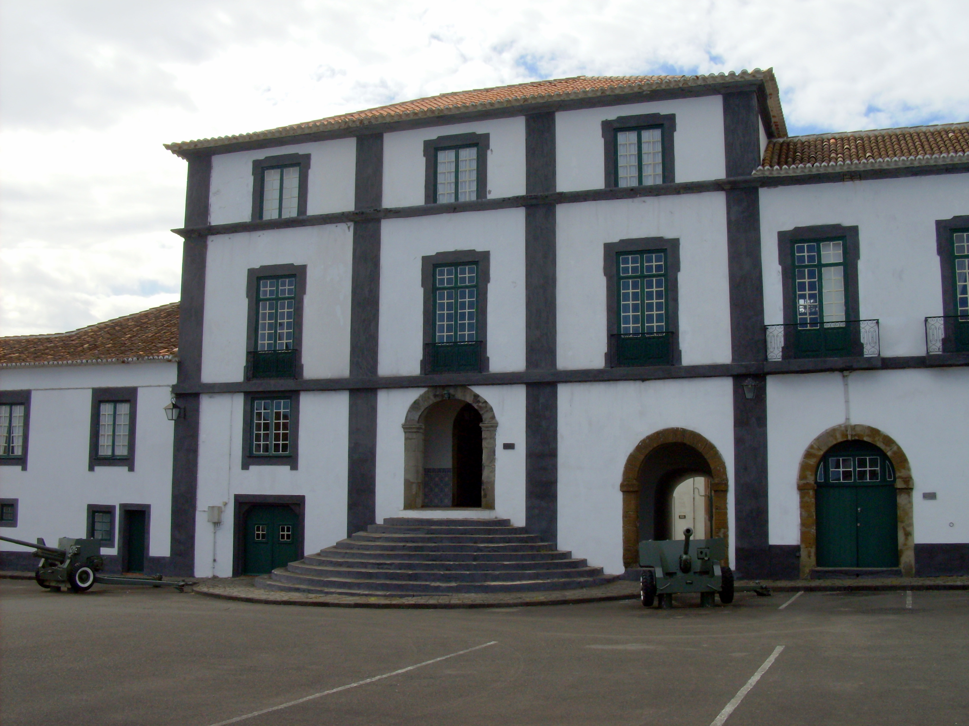 Fortaleza de São Sebastião do Monte Brasil, Angra do Heroísmo, ilha Terceira, Açores: fachada do Palácio dos Governadores.